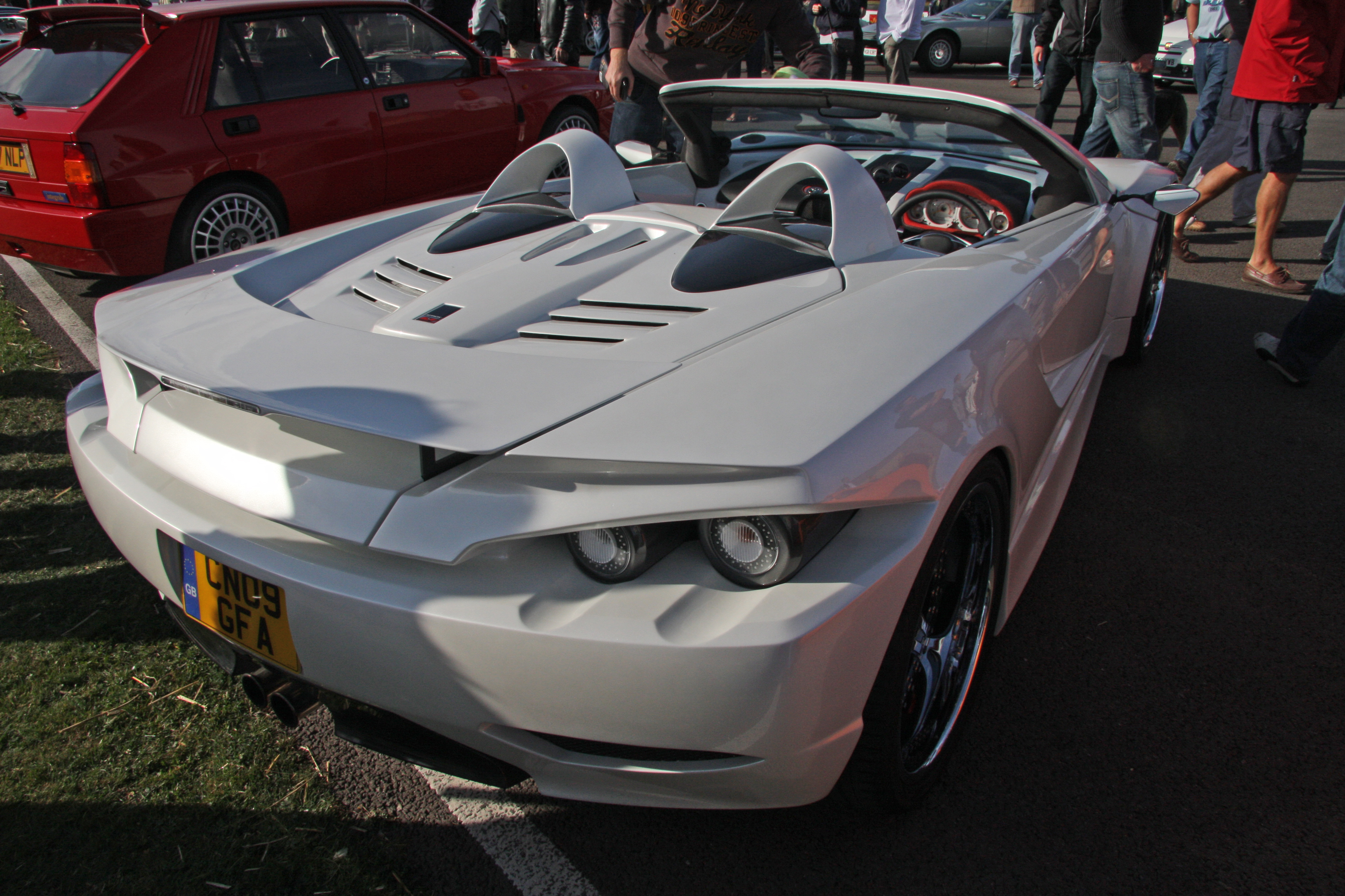 Asanti Attack K1